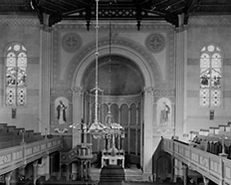 Innenraum der St.-Lukas-Kirche nach einer Abbildung von vermutlich 1896